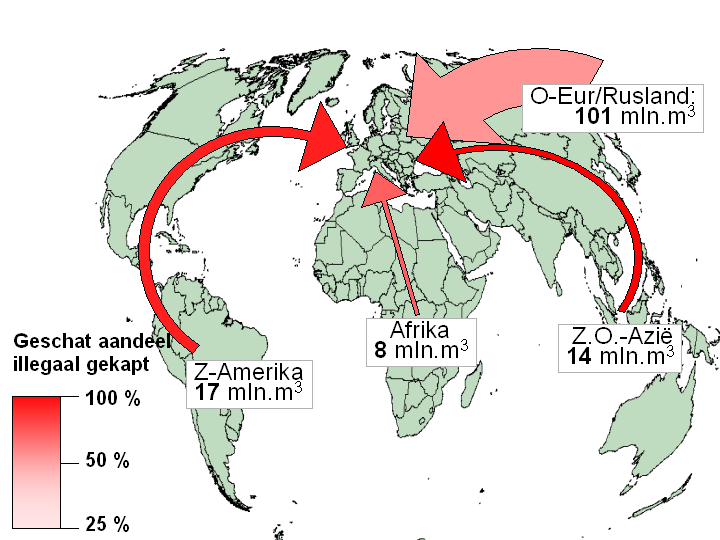 Eigen gemaakte media (gis&powerpoint) obv gegevens van / OECD: jaarlijkse houthandel vanuit werelddelen met EU-landen, inclusief % dat daarvan illegaal gekapt is volgens schattingen OECD.